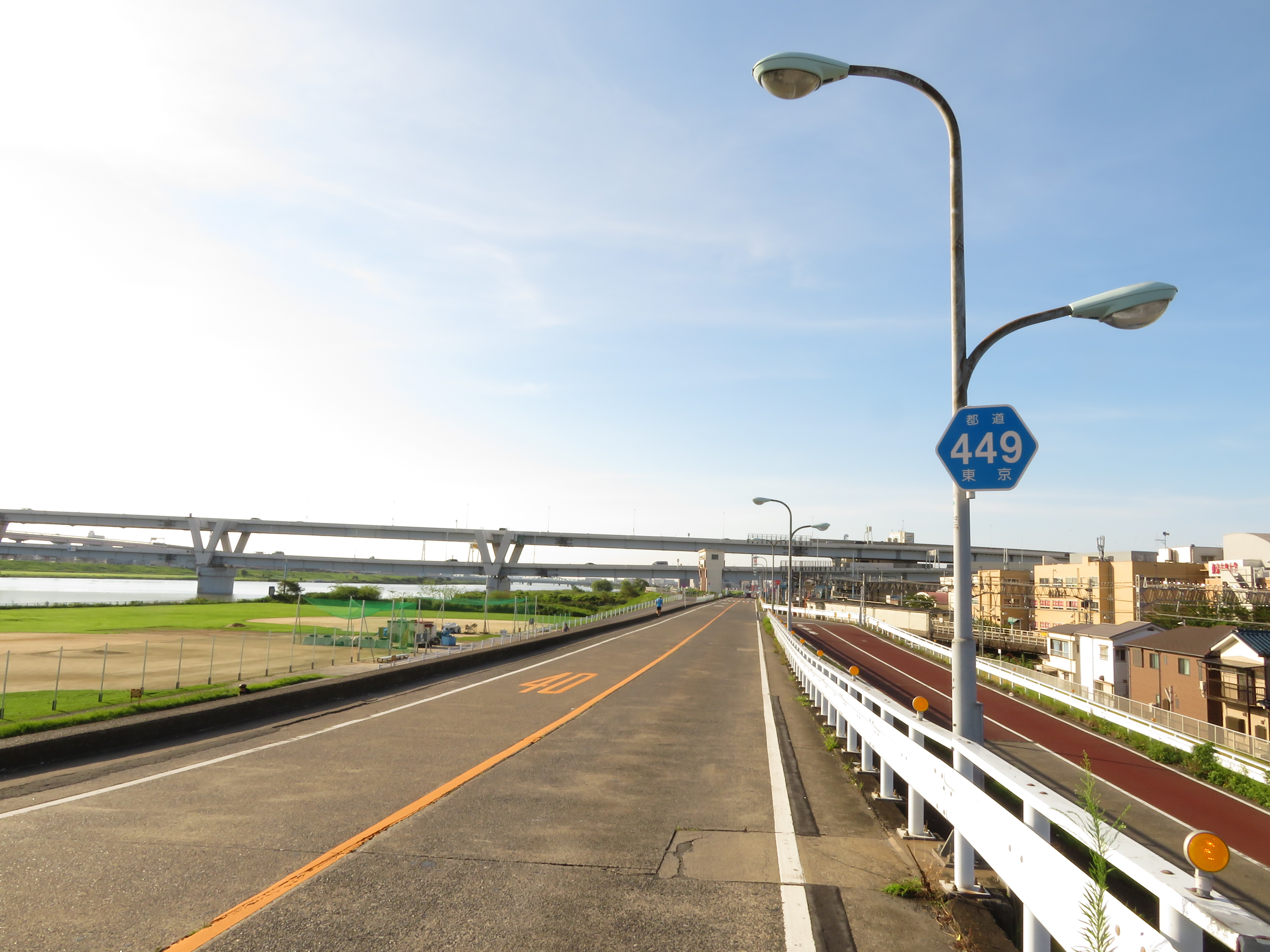 都道449号線足立区堀切橋西詰交差点付近（四つ木橋方面を撮影） Canon PowerShot SX720 HS